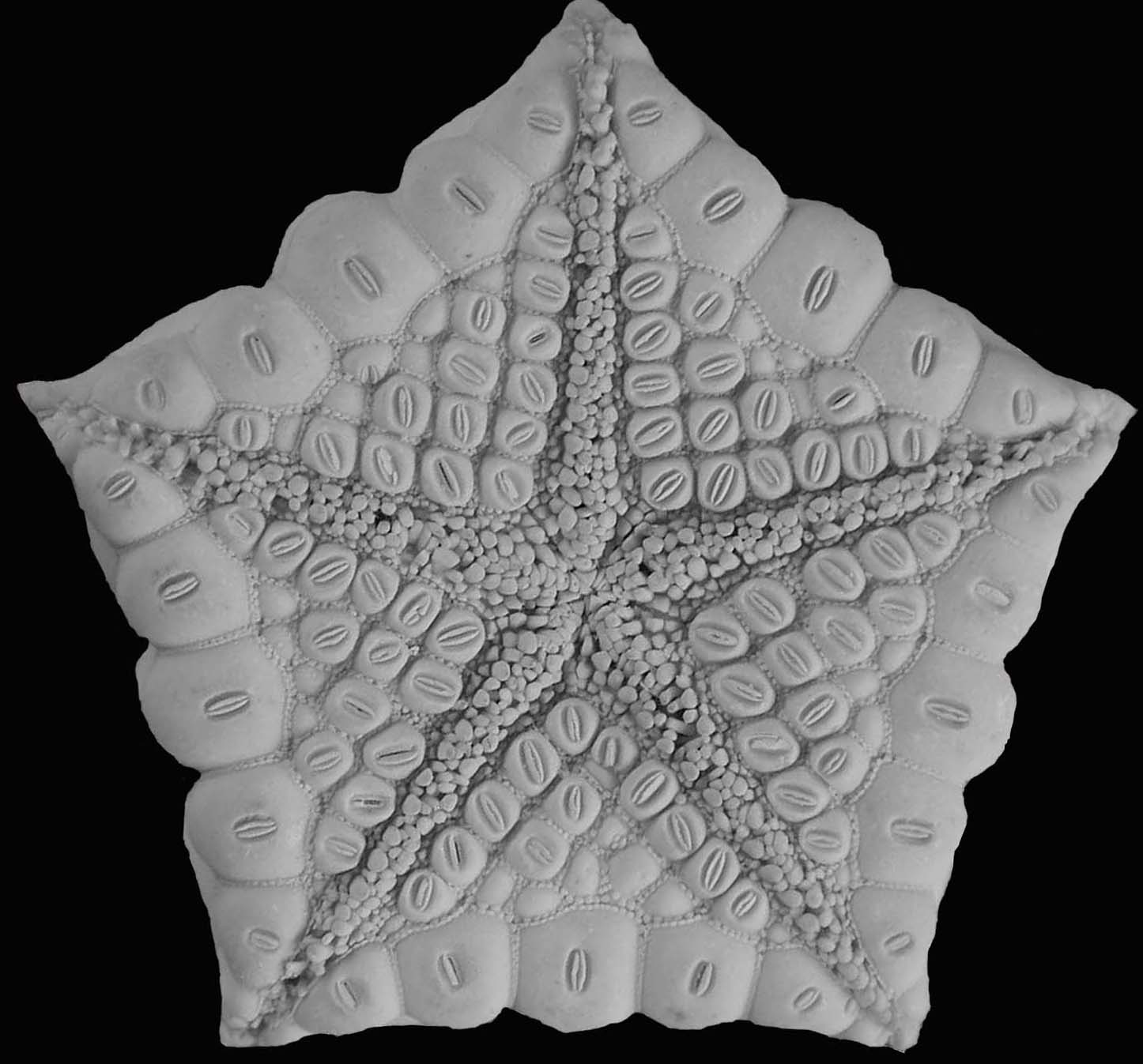 Photo scientifique de l'étoile de mer Akelbaster novaecaledoniae, face orale.